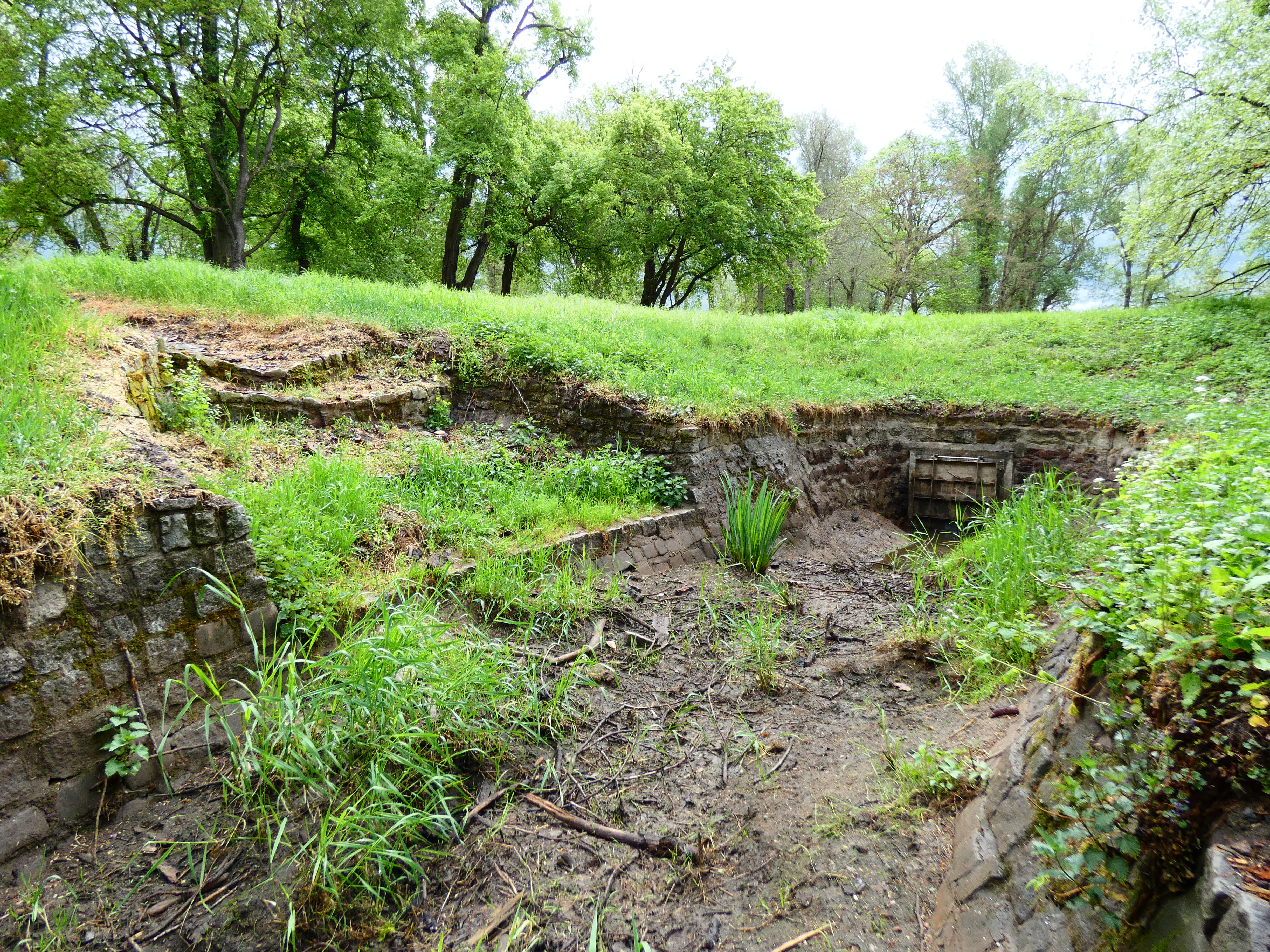 Beginn der Tauben Elbe in Magdeburg, links Überlauf von Alter Elbe, rechts bewehrter Durchlauf von Stromelbe